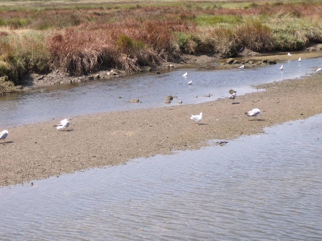 Onde está a ghaliña??? Ghaliñaaaa!! Búscalle as patas fosforitas!